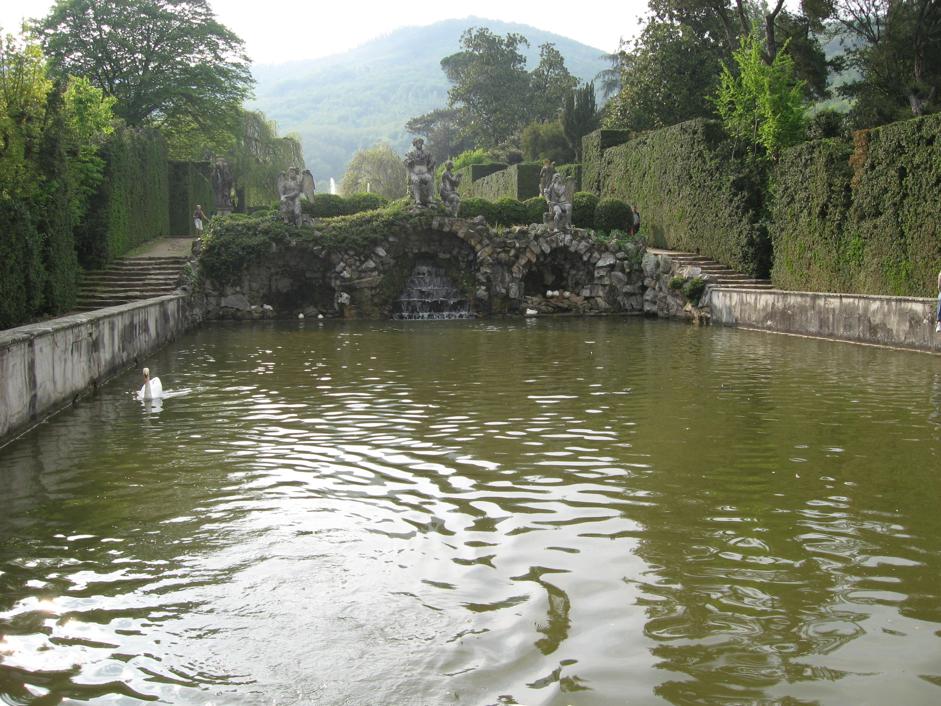 Parco di Villa Barbarigo a Valsanzibio